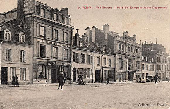 le salon degermann sur une catre ancienne.